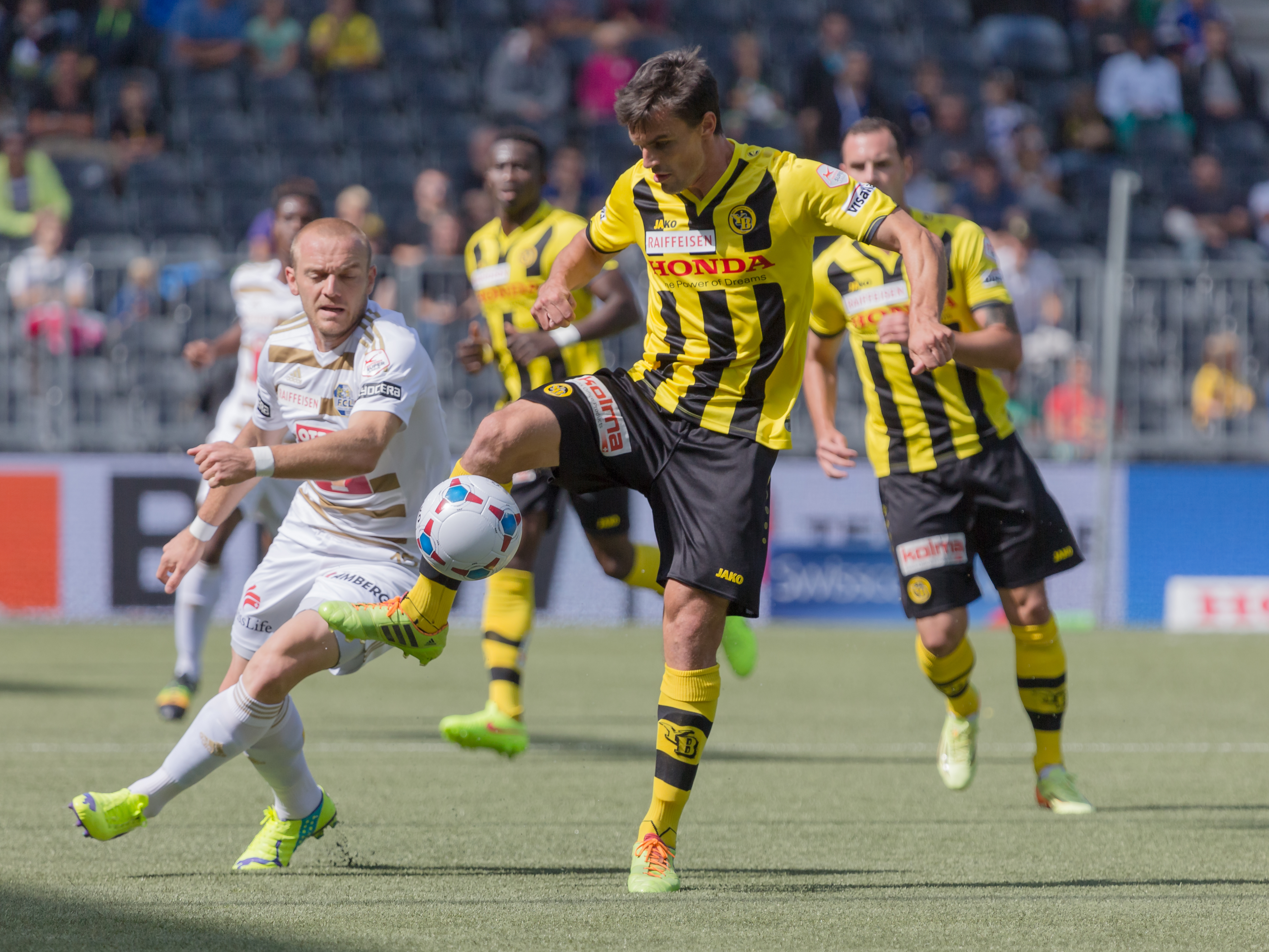 Zweikampf von Alain Rochat und Marco Schneuwly beim Spiel des BSC Young Boys gegen den FC Luzern